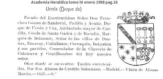 Stemma araldico di Francisco Gomez de Sandoval duca di Uceda